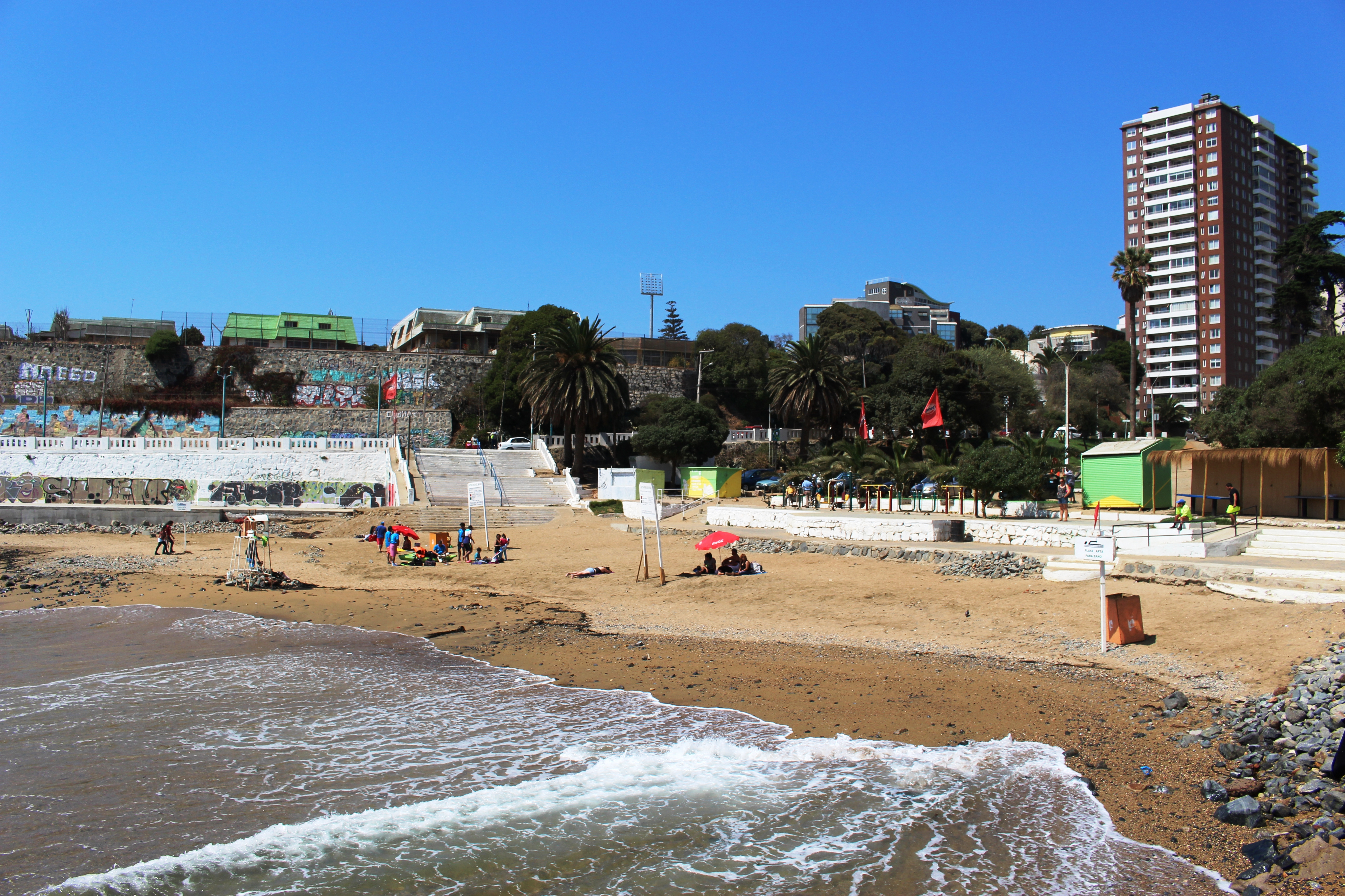 Playa Las Torpederas, balneario de la comuna de Valparaíso, Chile